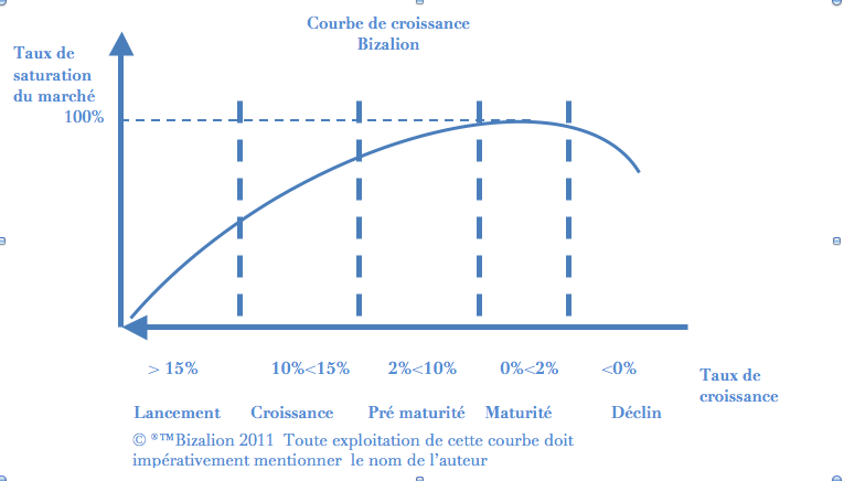 Nouvelle approche de la courbe de vie en utilisant le taux de croissance au lieu du temps en abscisse Unknown